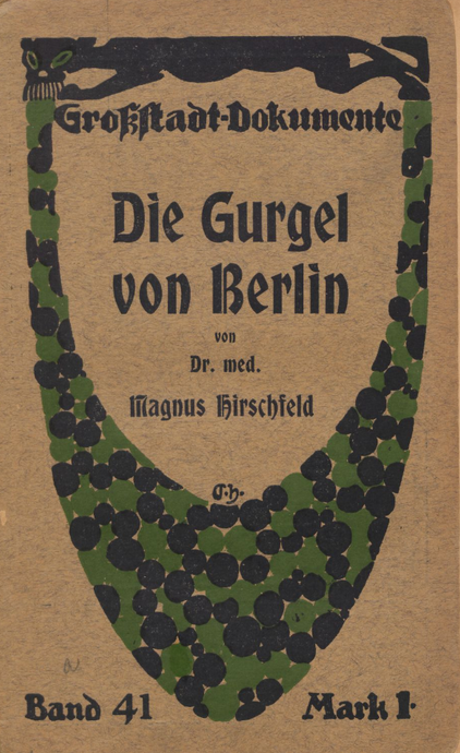 Die Gurgel Berlins. Großstadt-Dokument über den Alkoholismus, Titel und Titelbild der Erstauflage 1905, H. Seemann, Berlin u. Leipzig 1905.